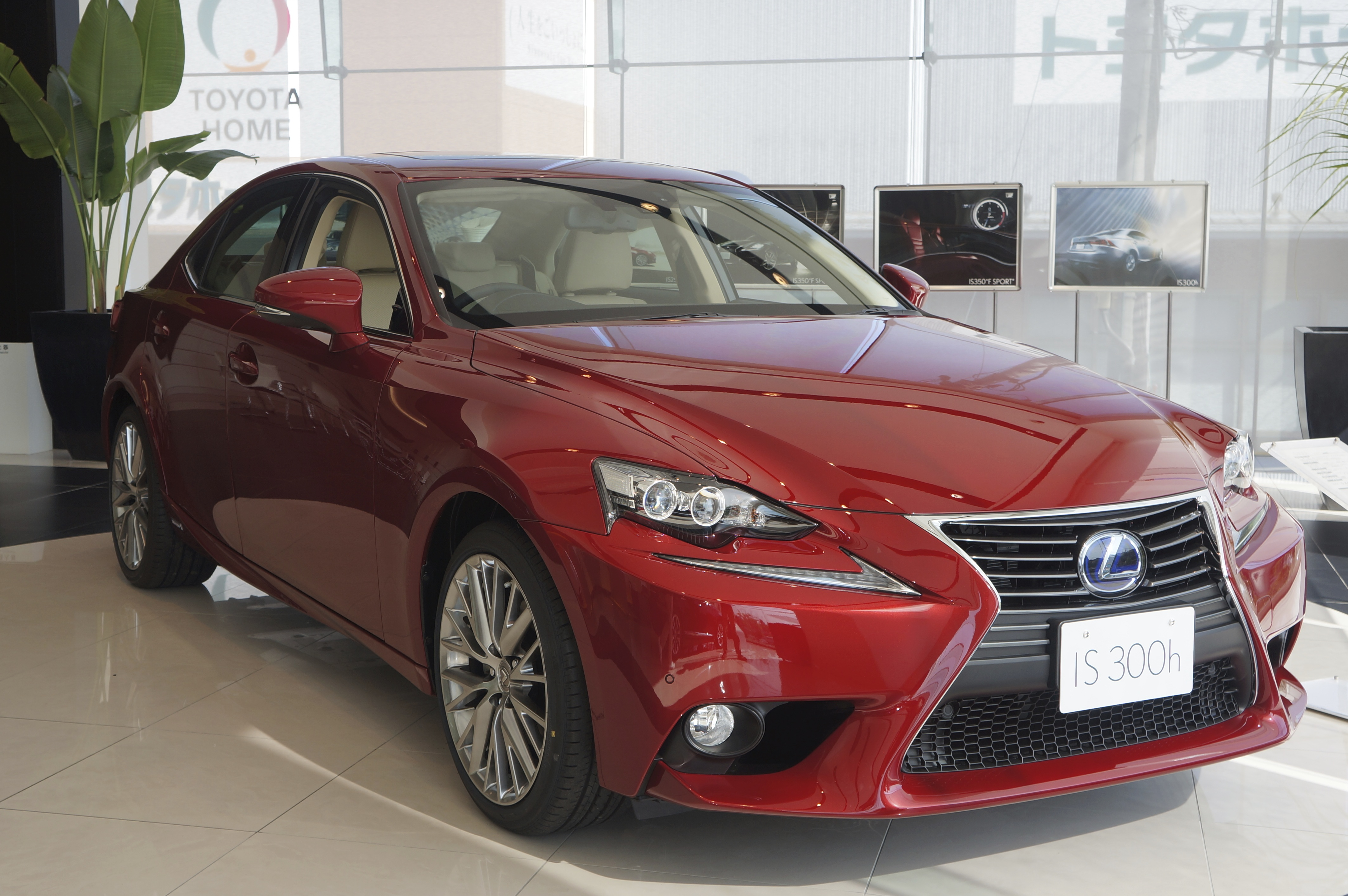 Lexus IS300h 2013 japan Front1